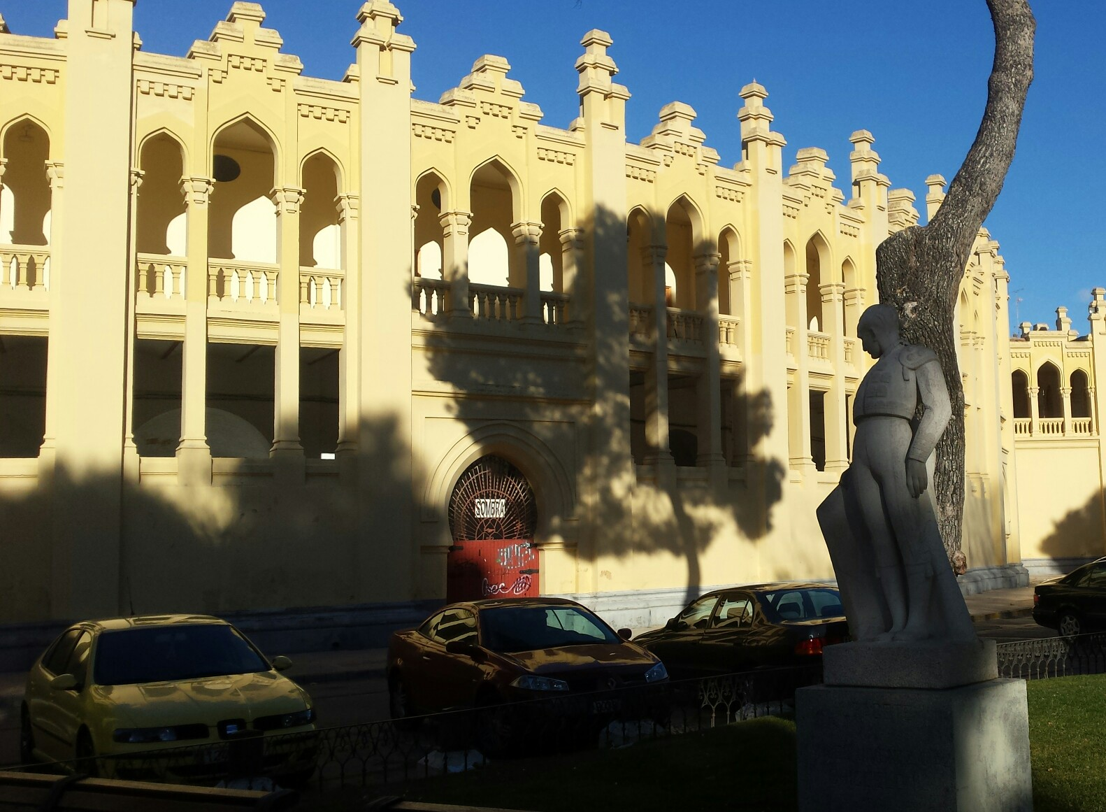 Chicuelo II